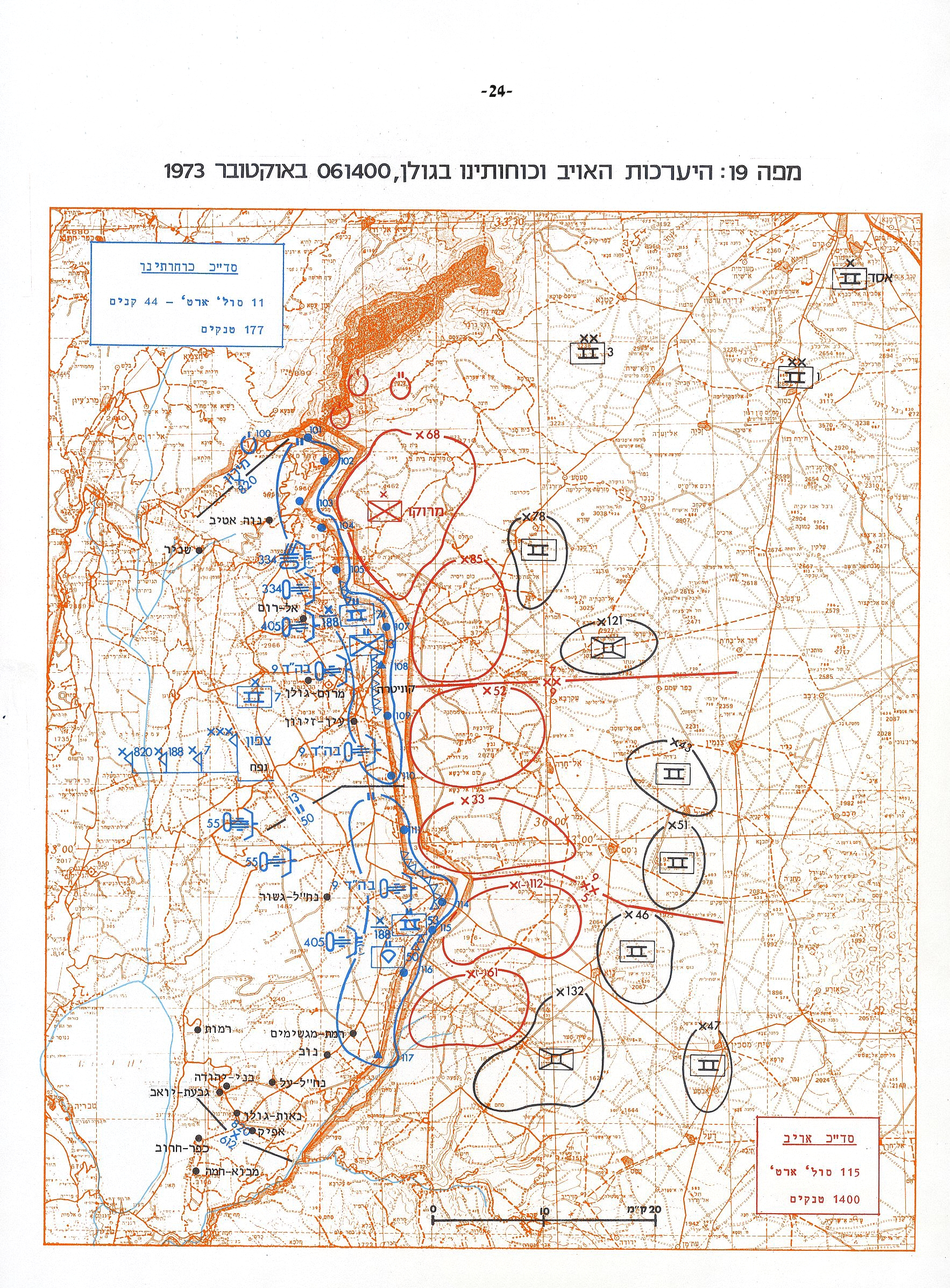 מפה 19 - היערכות צה"ל והצבא הסורי בגולן, 6 באוקטובר 1973 בשעה 14:00 - מלחמת יום הכיפורים